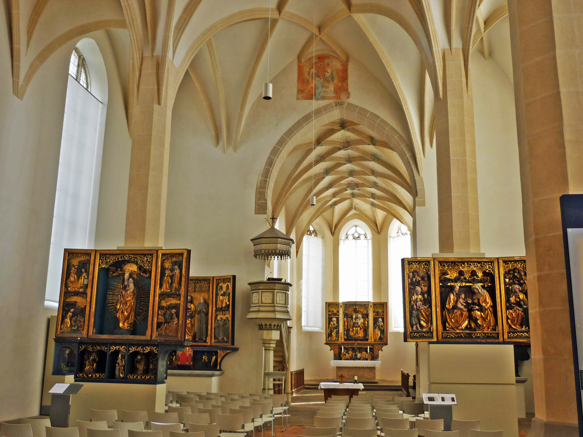 Kamenz, ehemalige Klosterkirche St. Annen, jetzt Sakralmuseum, Innenraum mit 5 Altartafeln